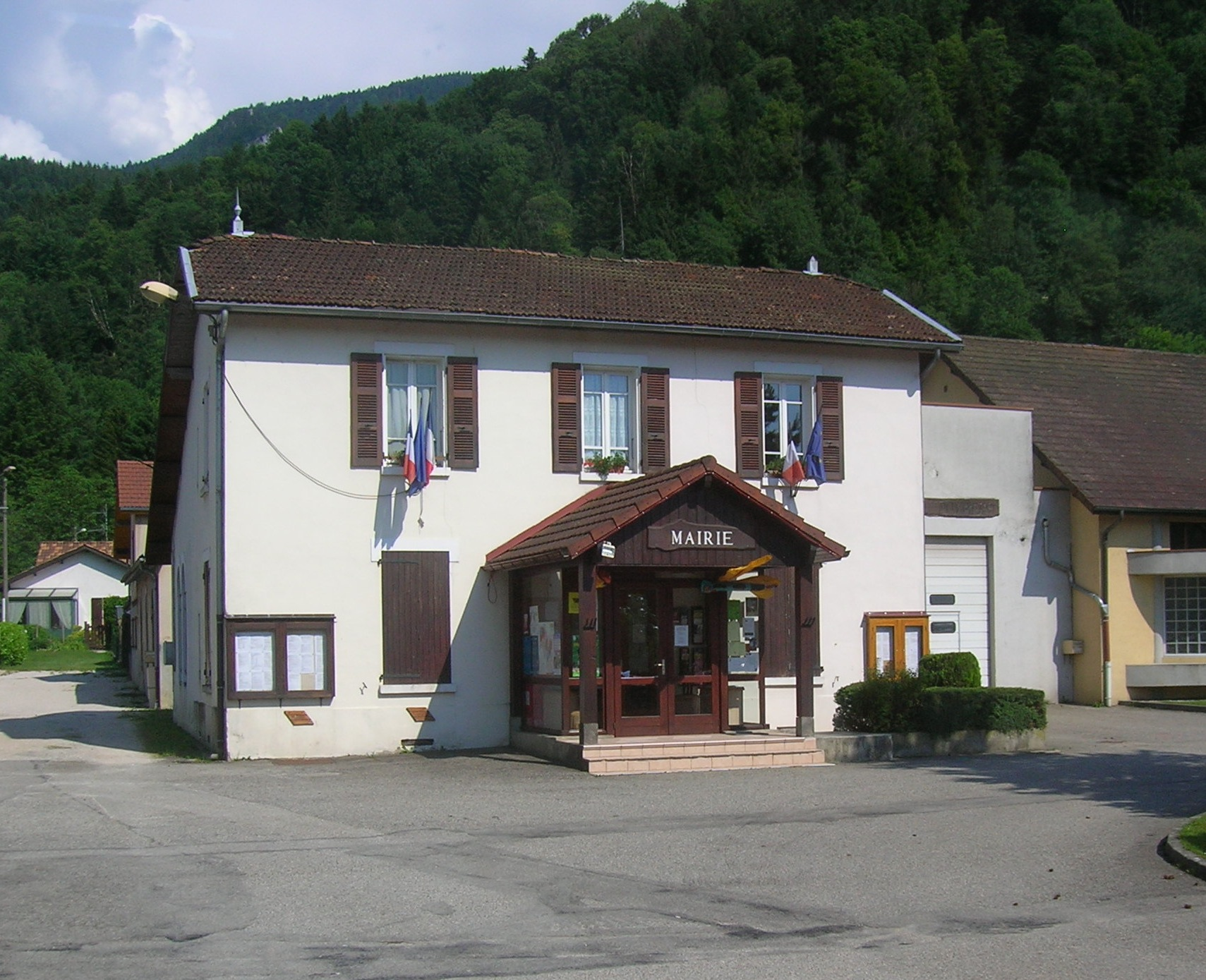 Saint-Joseph-de-Rivière, mairie